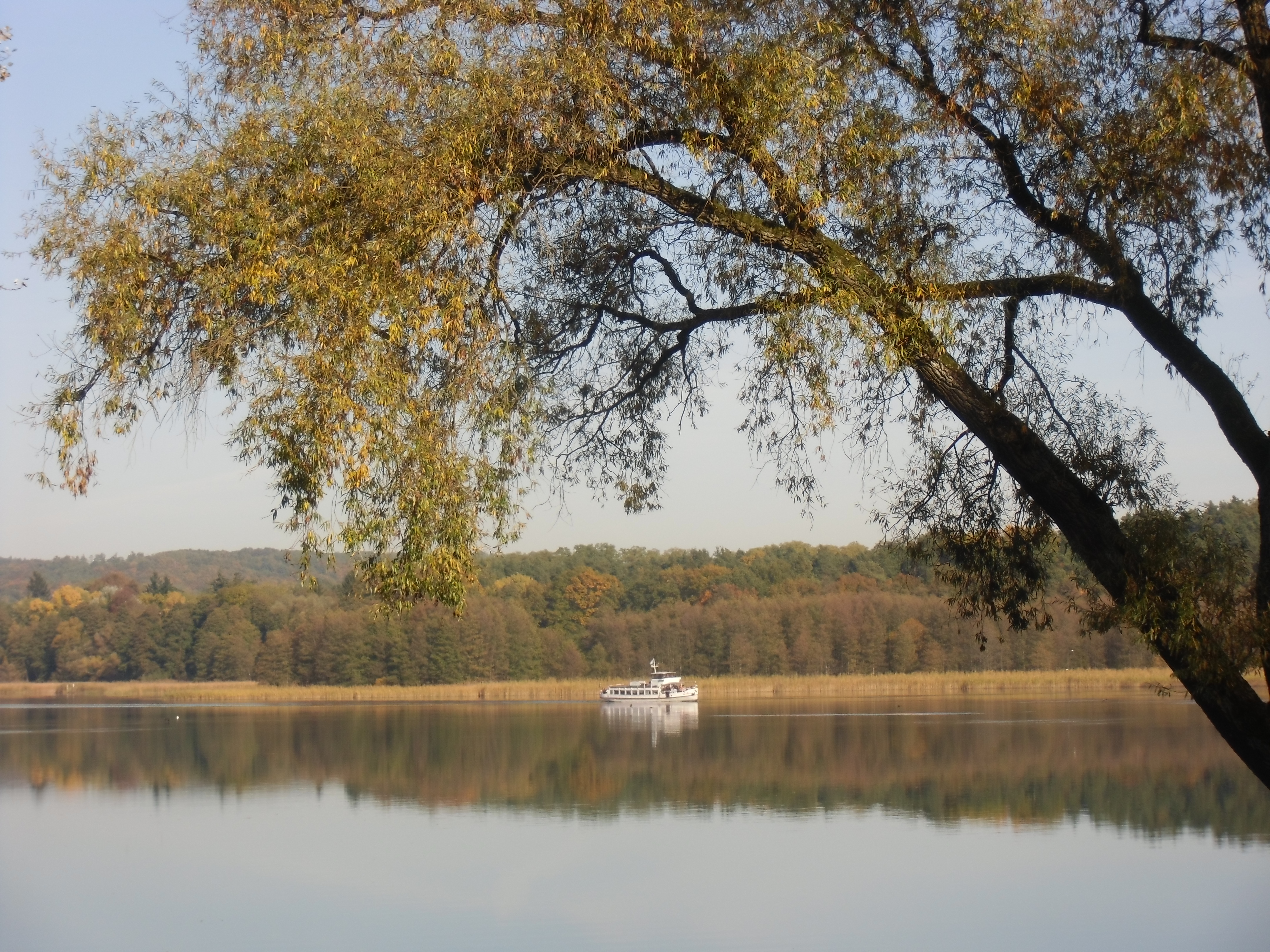 Blick von der Fischerkehle auf den Schermützelsee